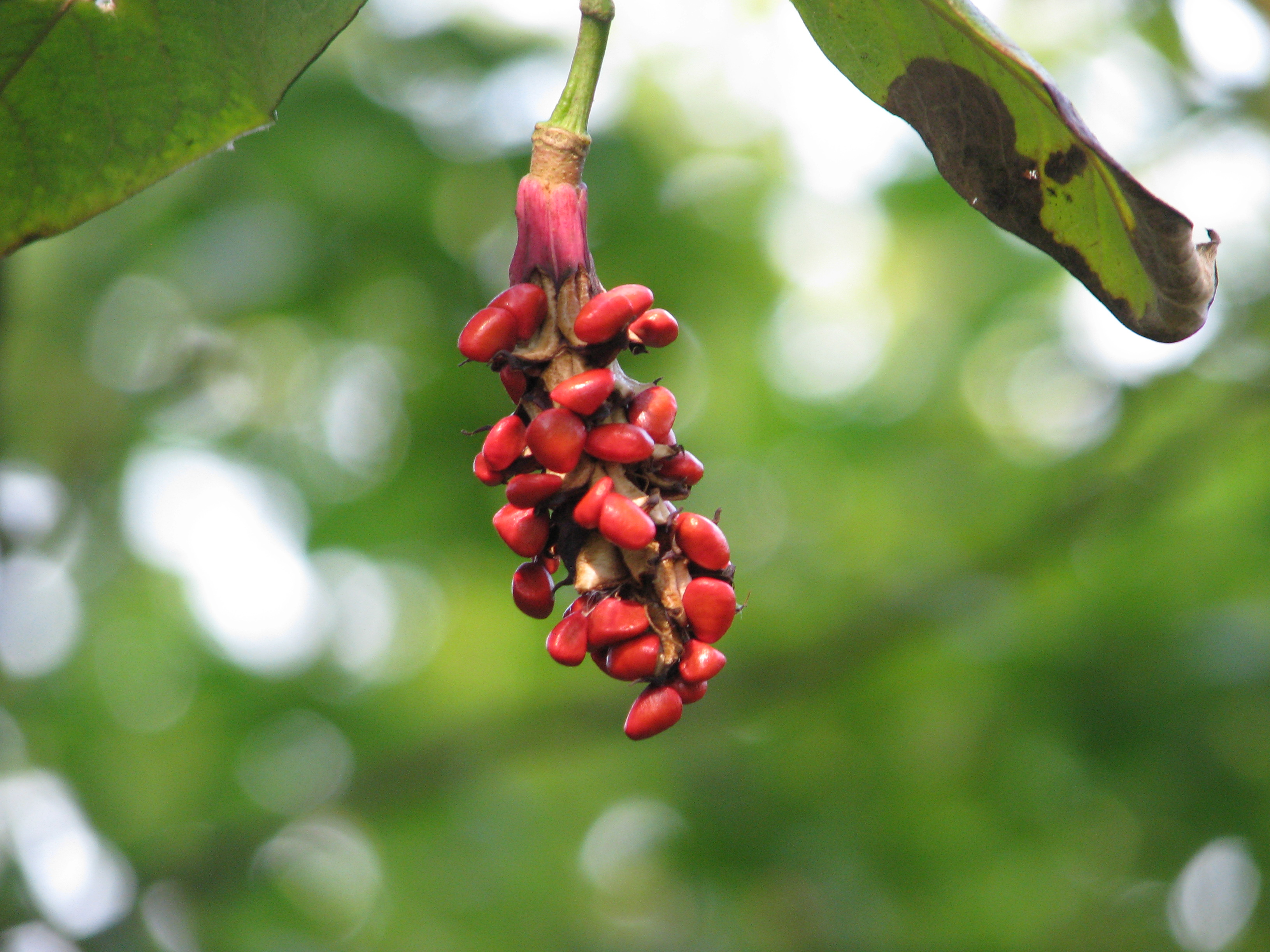 Magnolia wilsonii fruit